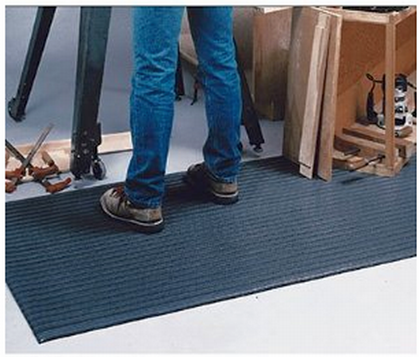 Tapete antifatiga de caucho con burbuja de aire